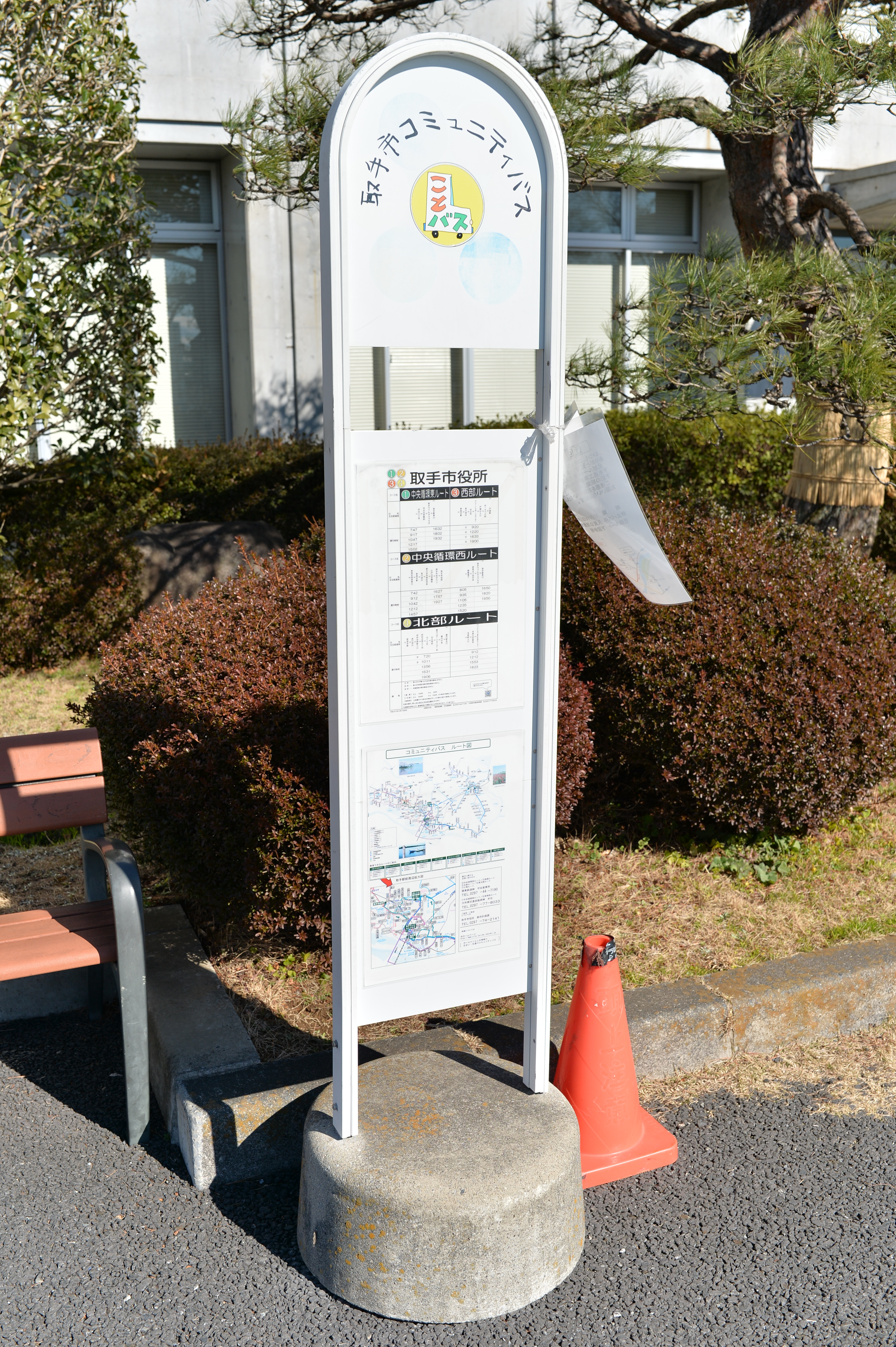 取手市役所バス停の標識